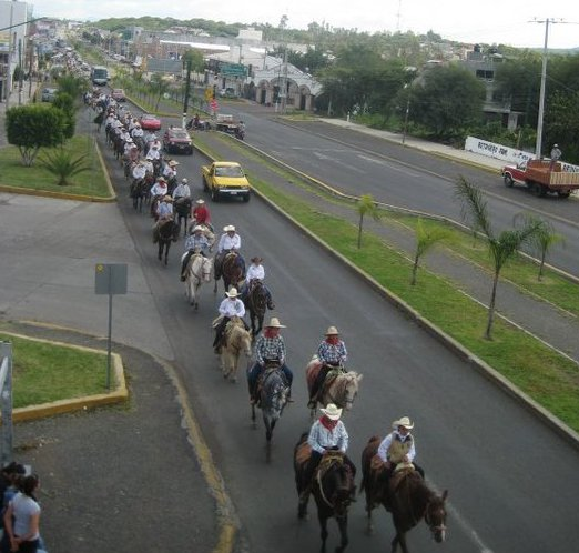 Foto de Uriangato, Guanajuato — 2011.